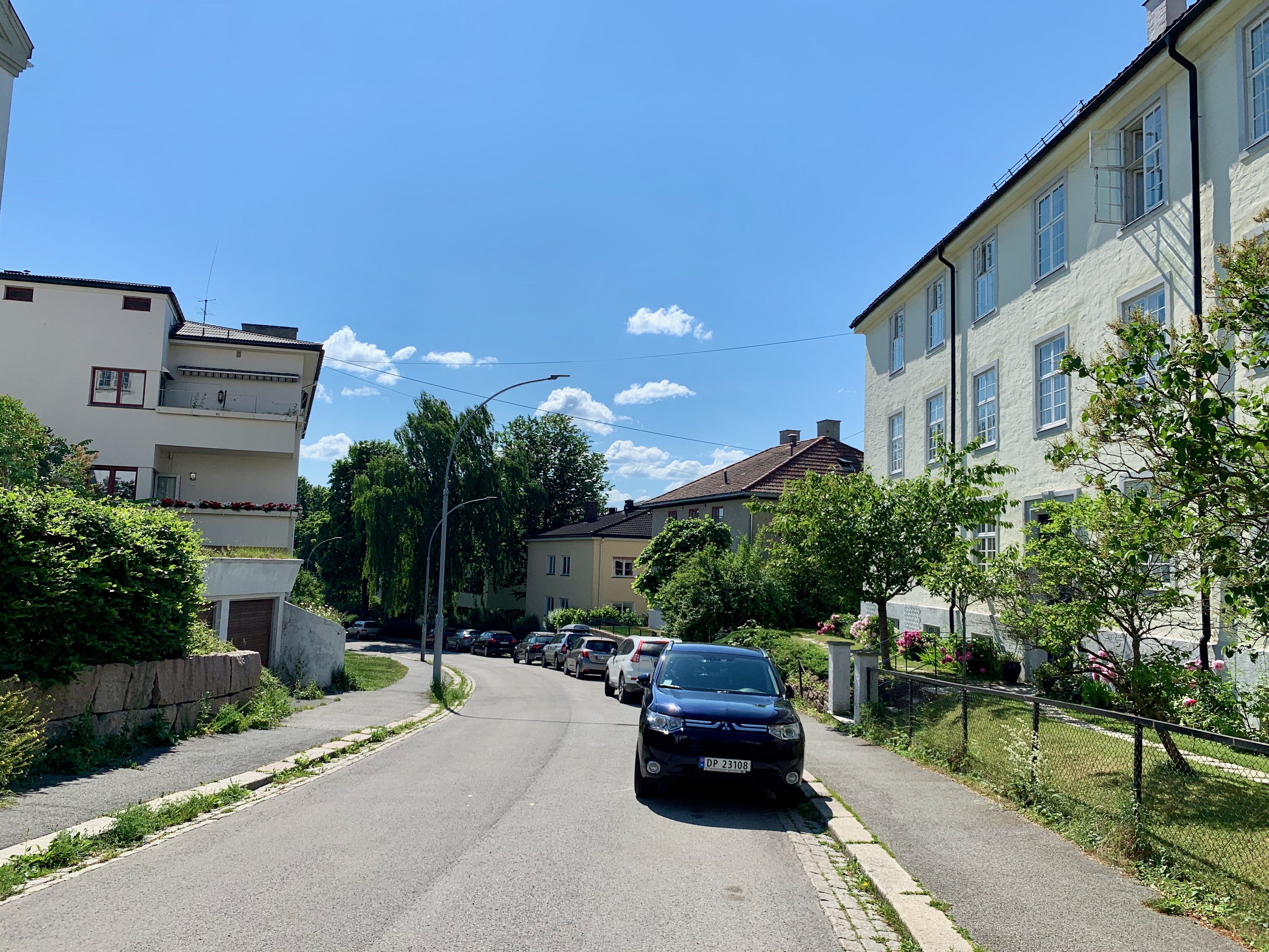 Pavels' gate i Oslo.